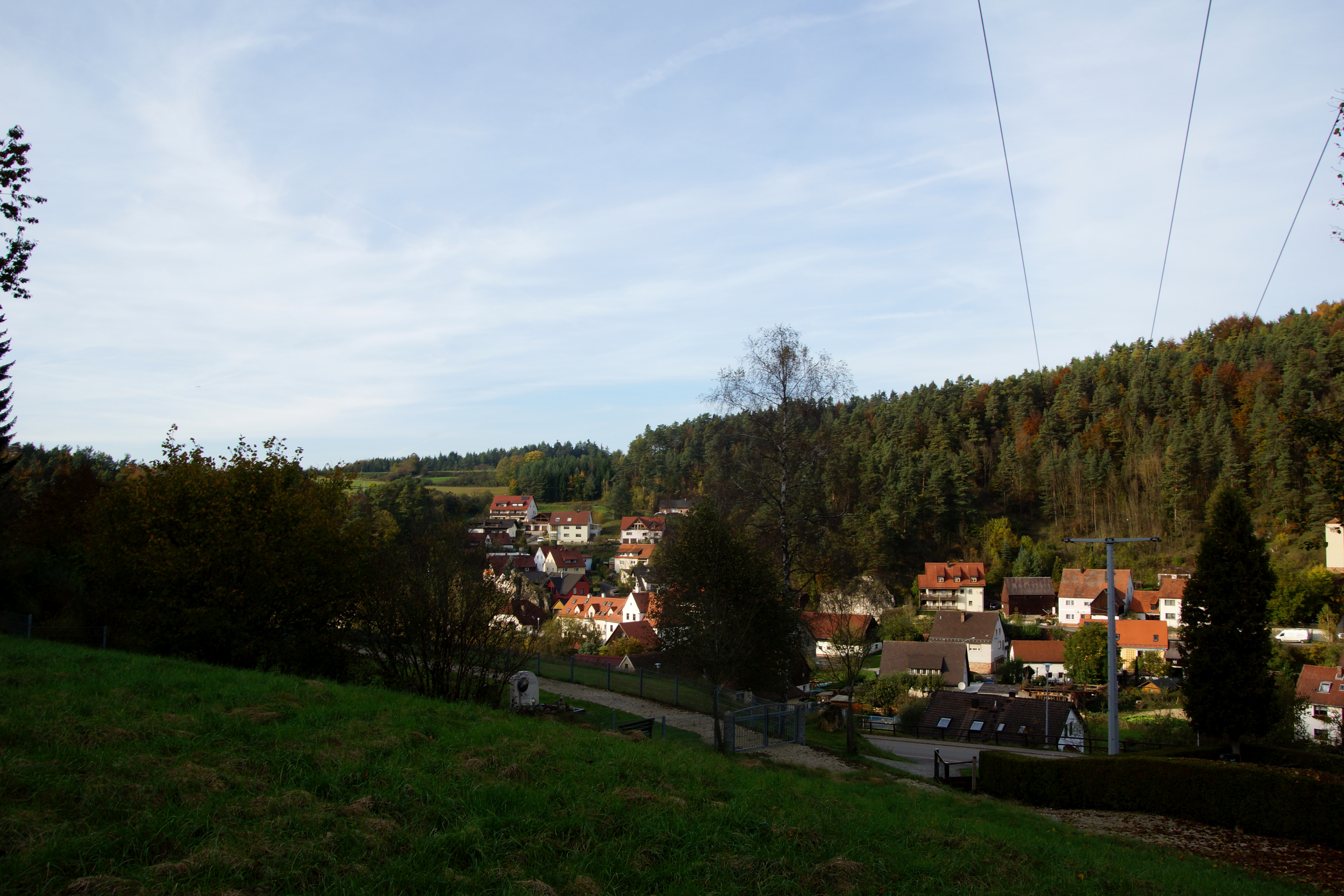 Högen bei Wiegendorf im Oberpfälzer Landkreis Amberg-Sulzbach